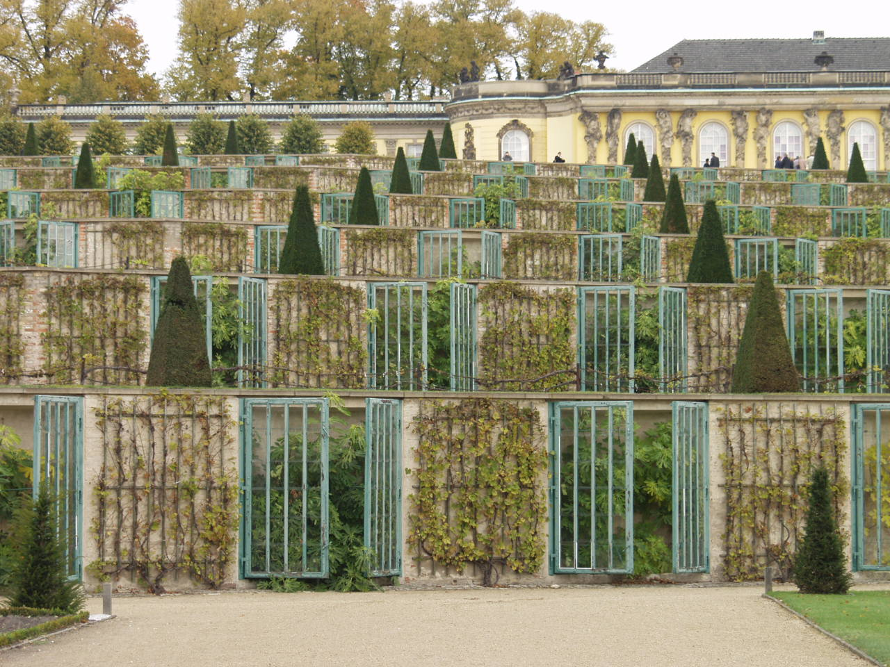 Sanssouci Gardens